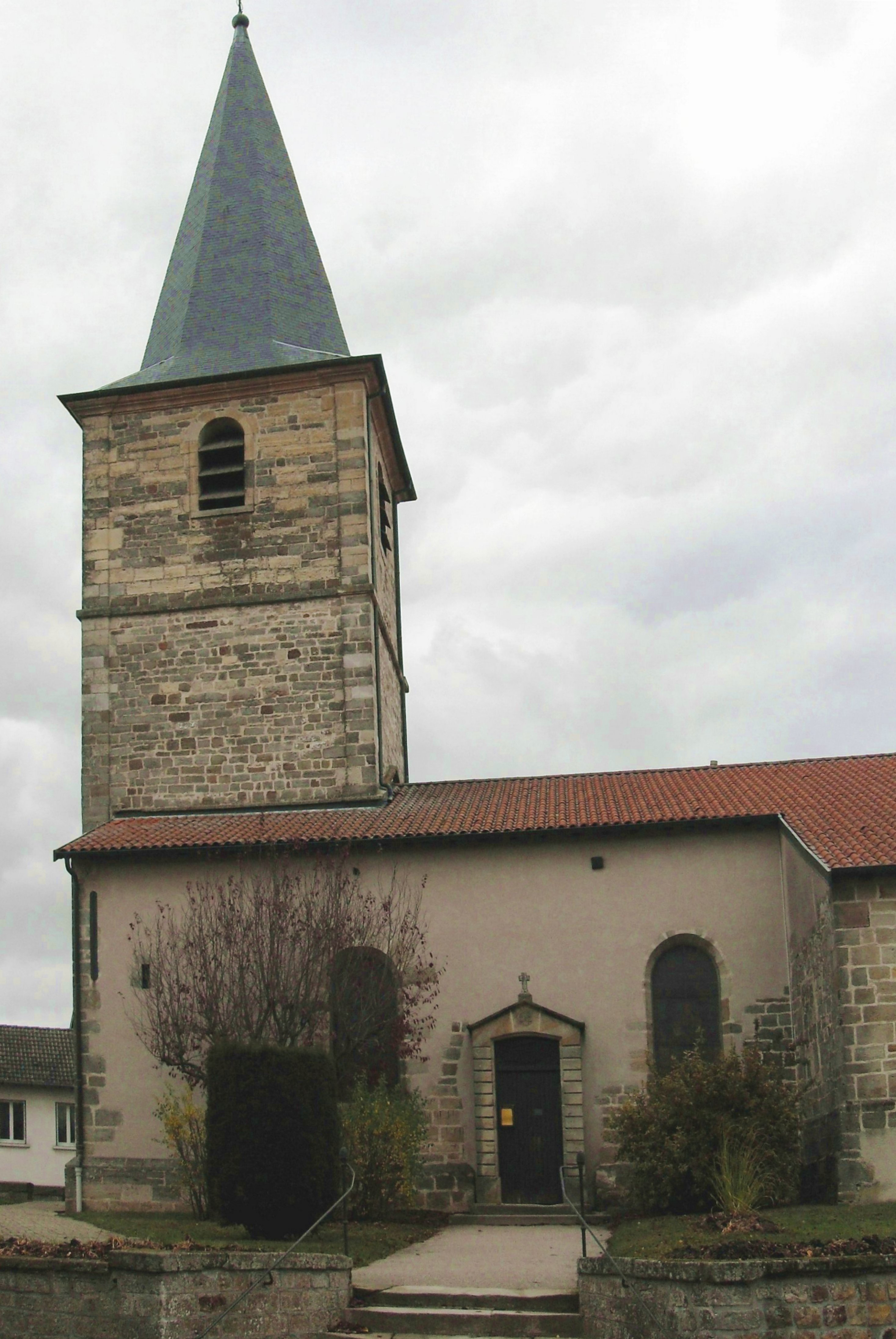 L'église Saint-Pierre-et-Saint-Paul à Bulgnéville